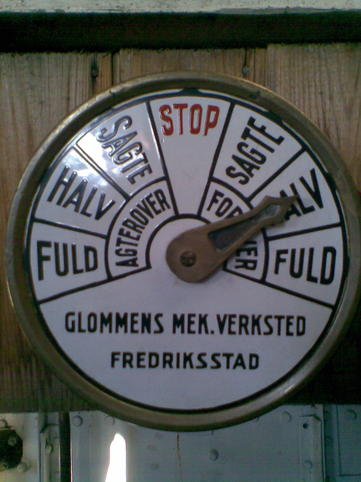 Soot på halv damp